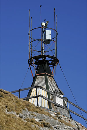 Altes Wetterhäuschen auf dem Pilatus